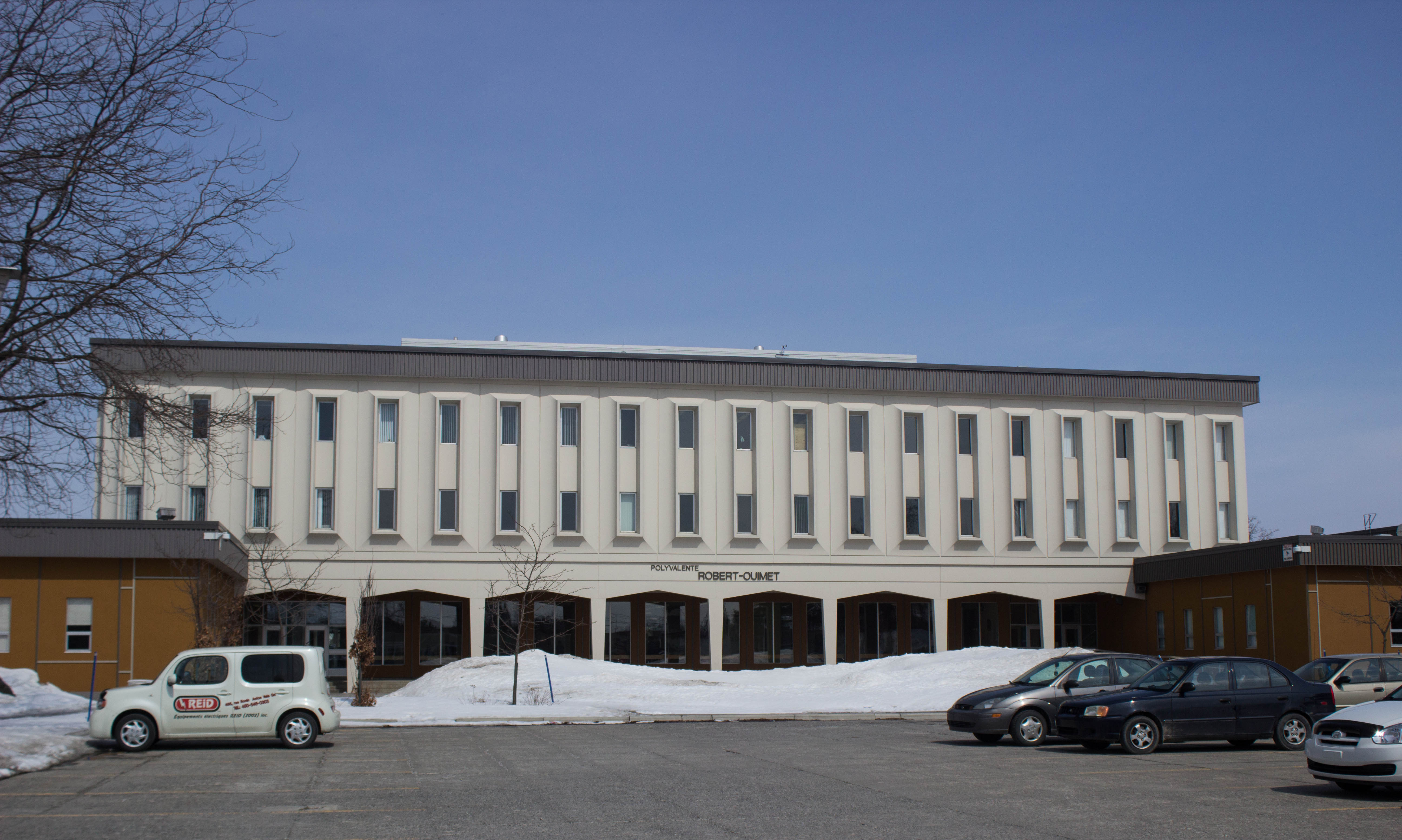 École secondaire (polyvalente) Robert-Ouimet à Acton Vale. L'édifice abrite aussi la salle Laurent-Paquin.